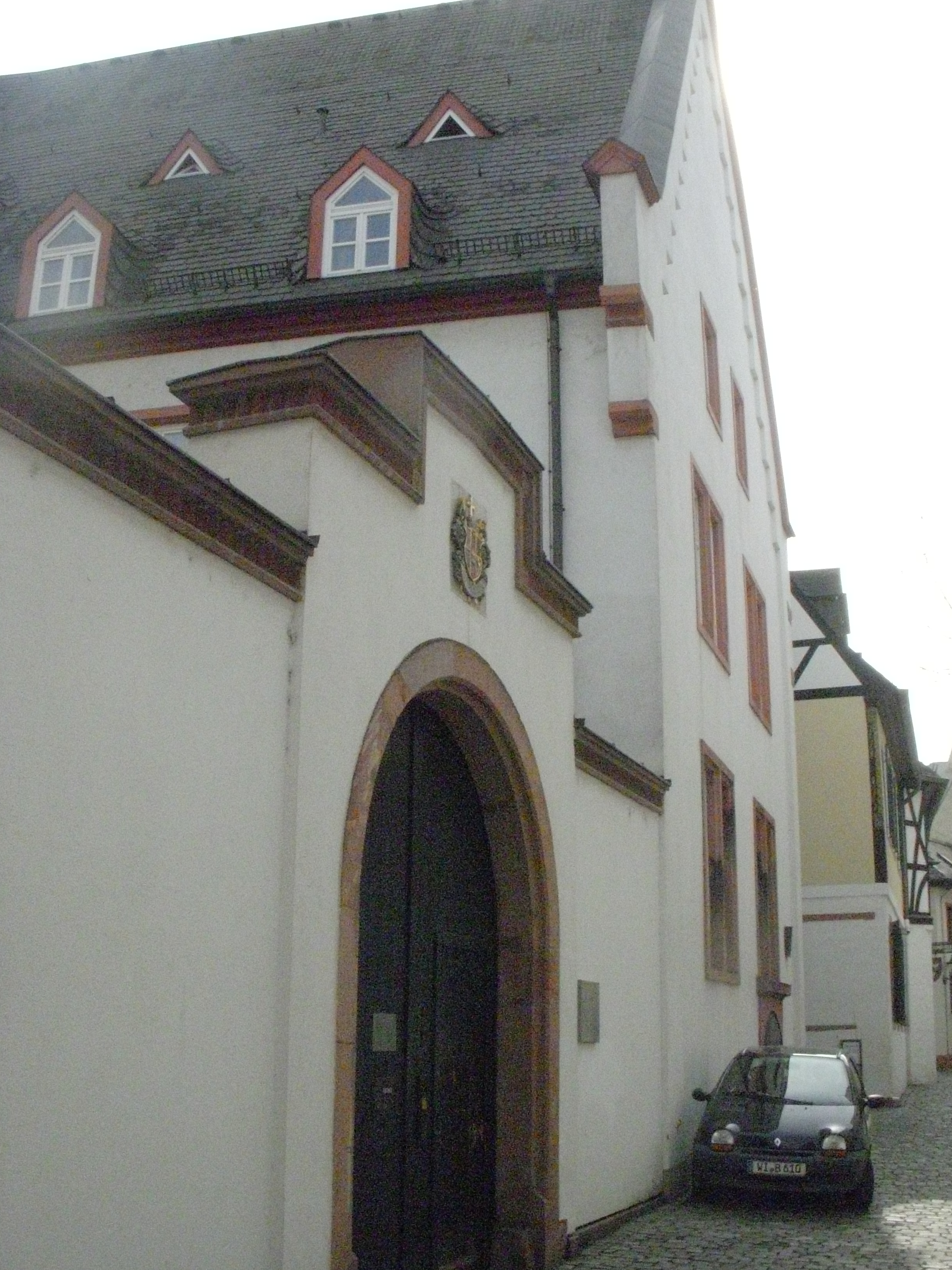 Hof zum Homberg, Kappelhofstraße Mainz